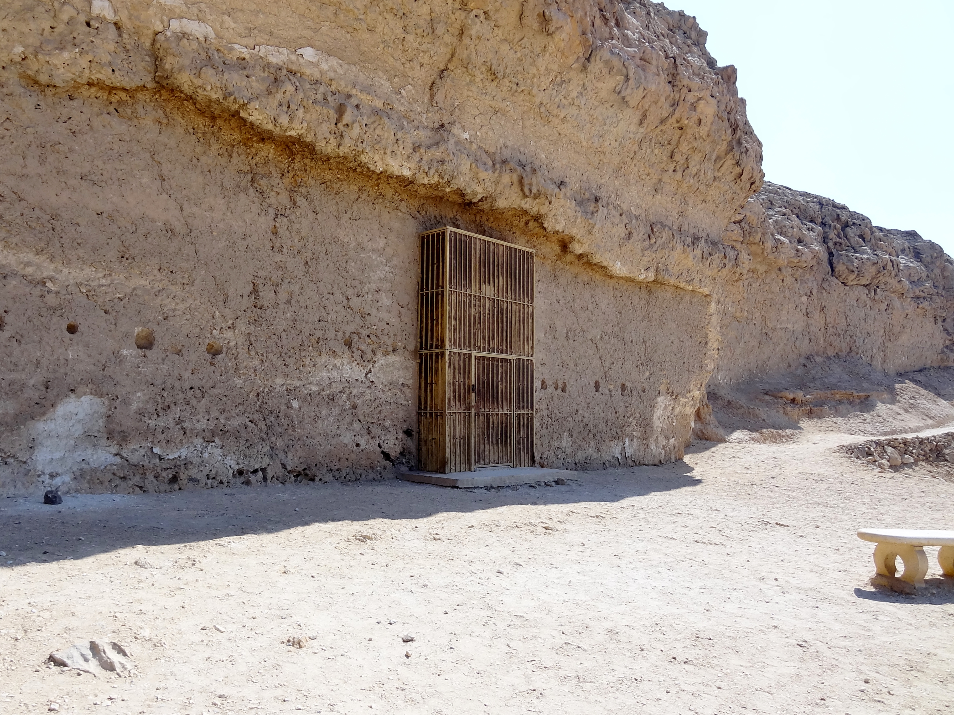 Grab des Pentu (TA 5) in Tell el-Amarna, Ägypten